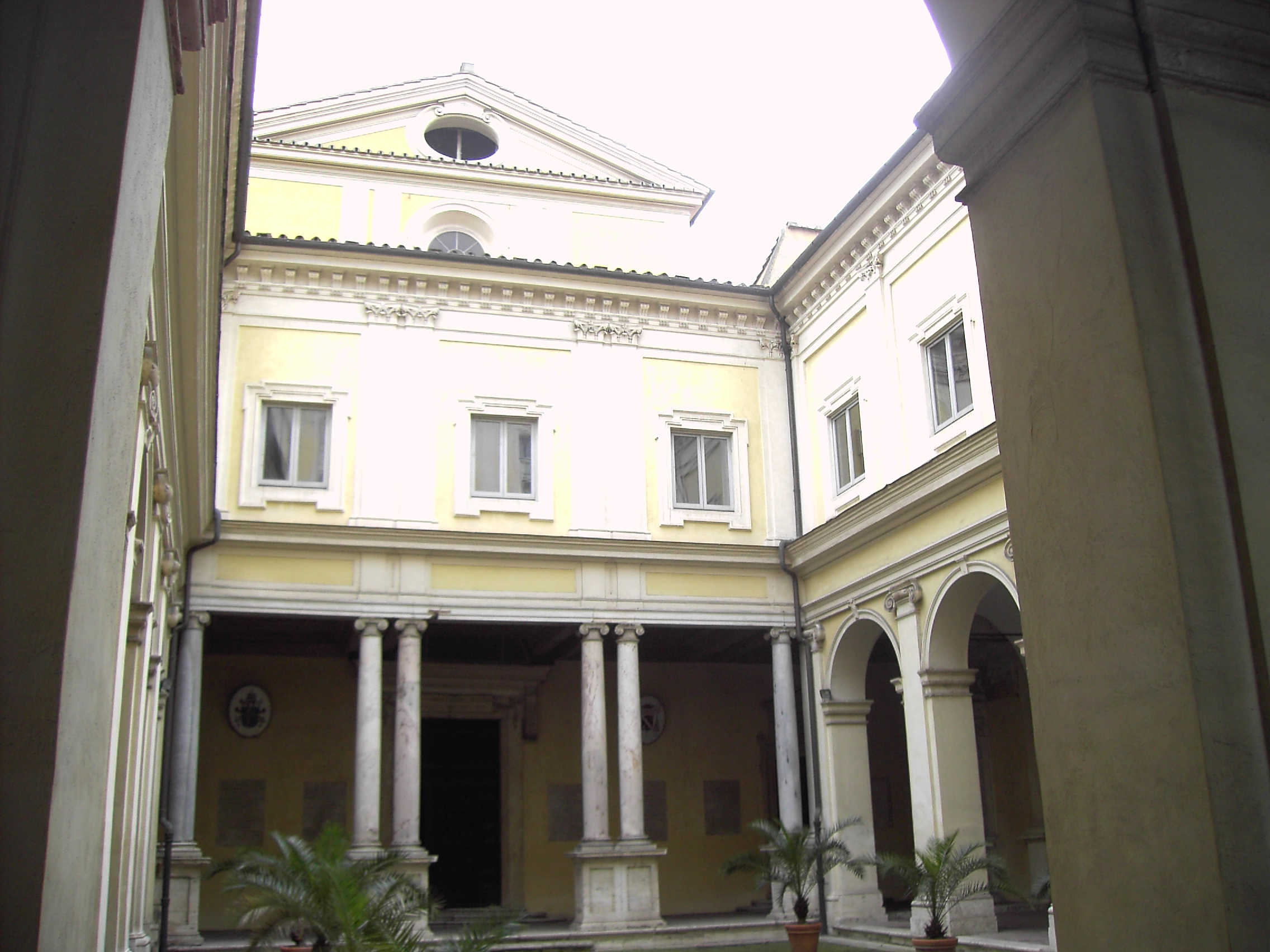 Roma, San Gregorio al Celio, cortile d'ingresso